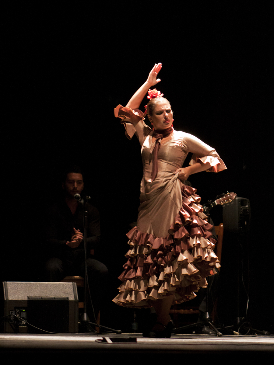 Pastora Pavón. La bailaora trae a la provincia de Sevilla las últimas piezas de su espectáculo ‘Pastora’, de creación propia, flamenco puro, con un elenco compuesto por Ramón Amador a la guitarra y Juan José Amador y Cristian Guerrero, al cante, que la acompañan